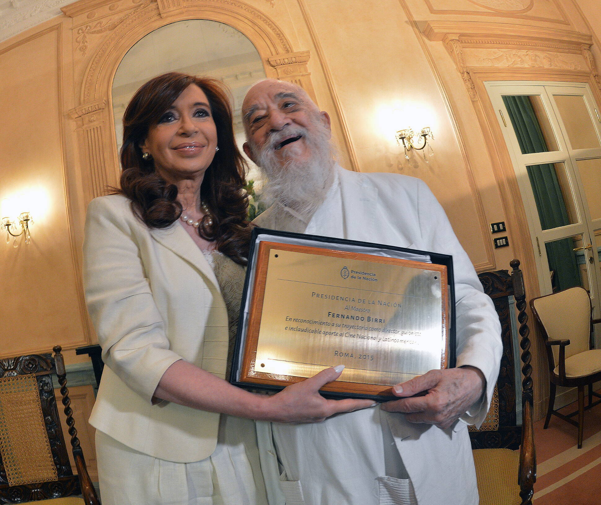 Fernando Birri y Cristina Fernández de Kirchner en Roma durante un reconocimiento hecho al cineasta en 2015